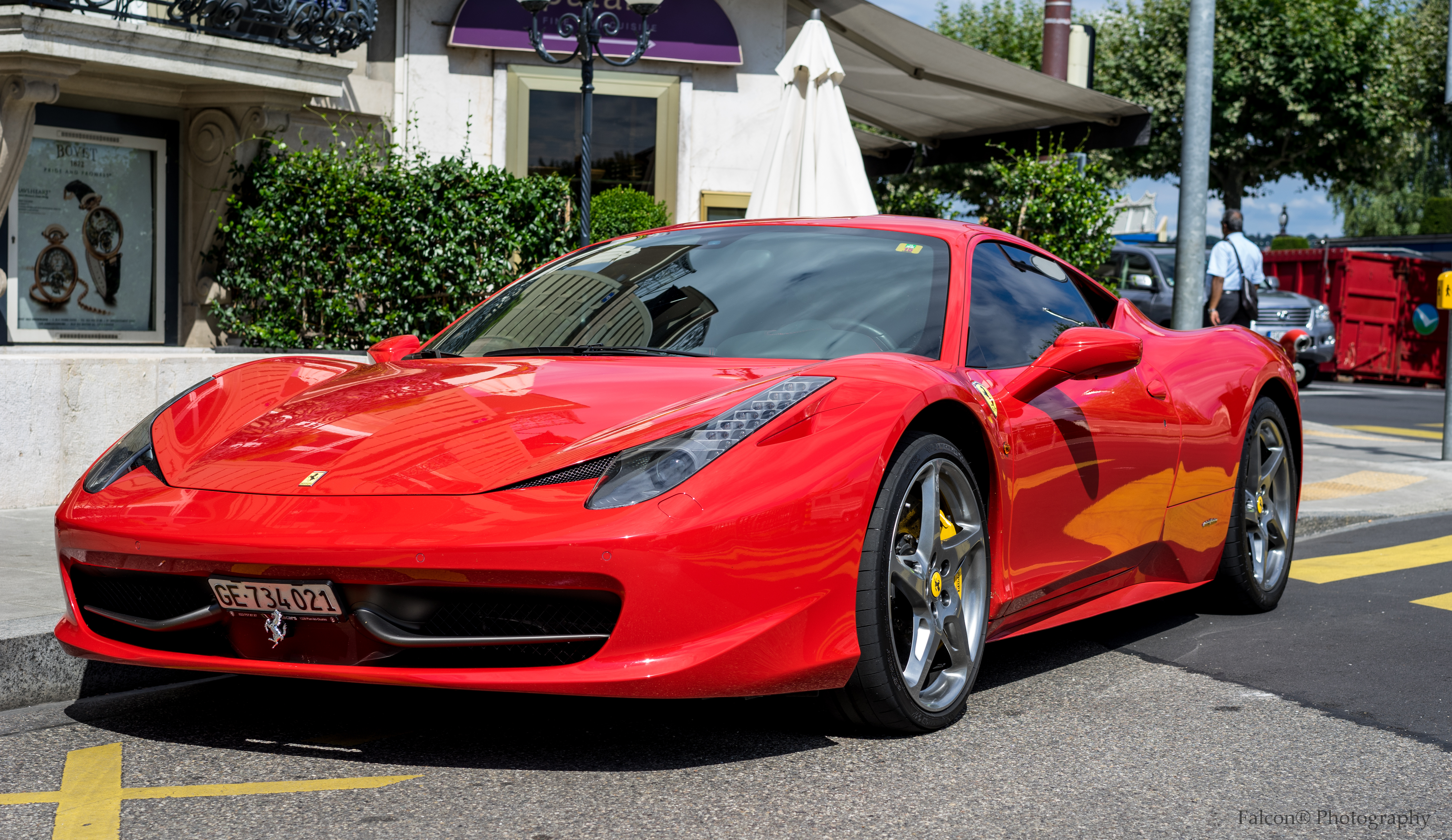 458 Italia 2012